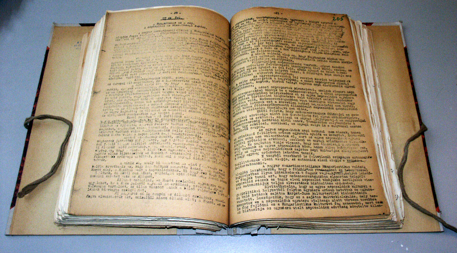 Dosszié a Történeti Levéltár irataiból